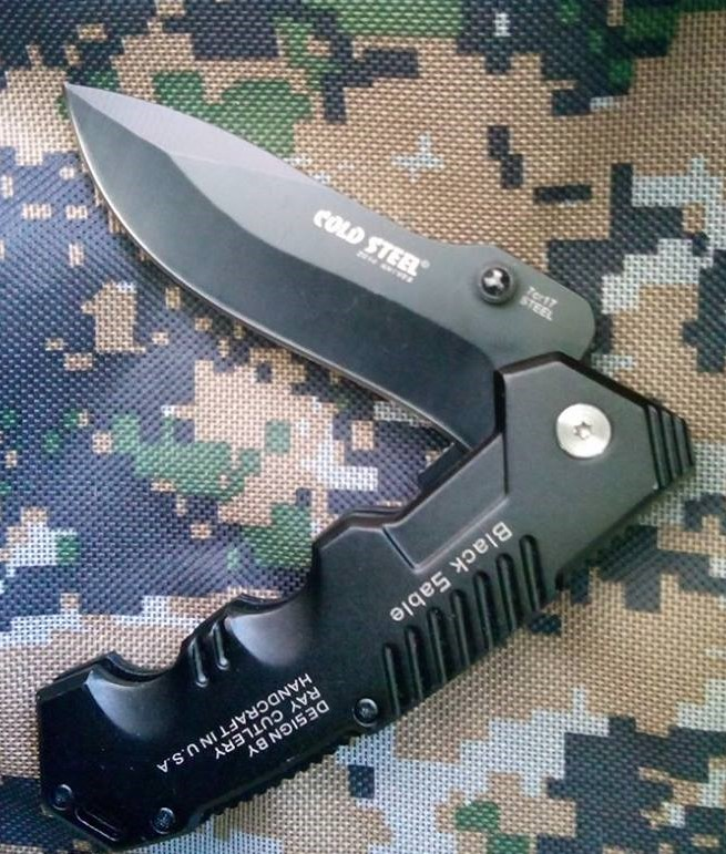 Ամերիկյան արտադրության ծալովի դանակ կիսաբաց վիճակում